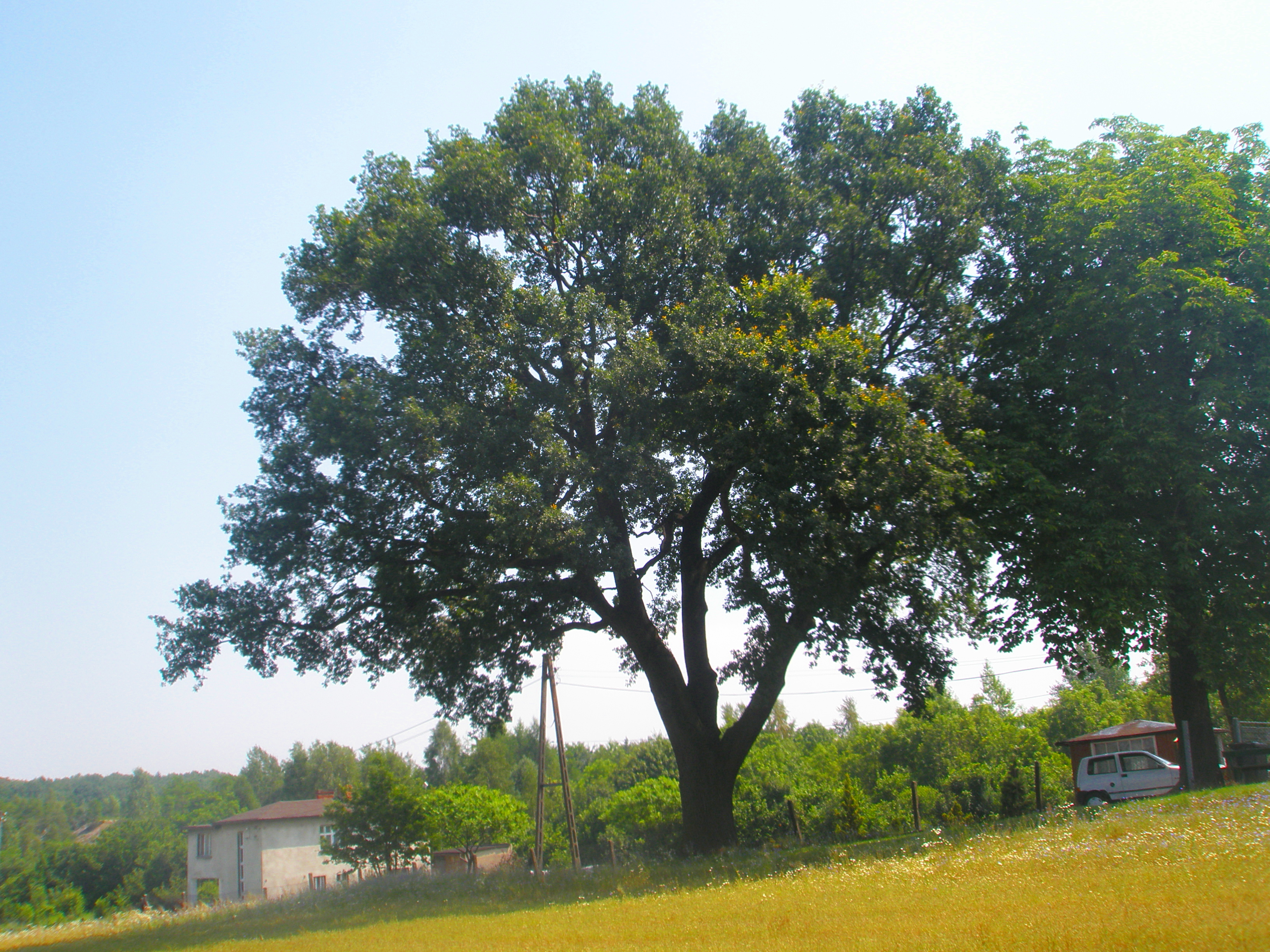 Dąb szypułkowy "Jan" - pomnik przyrody w Jankowicach Rybnickich